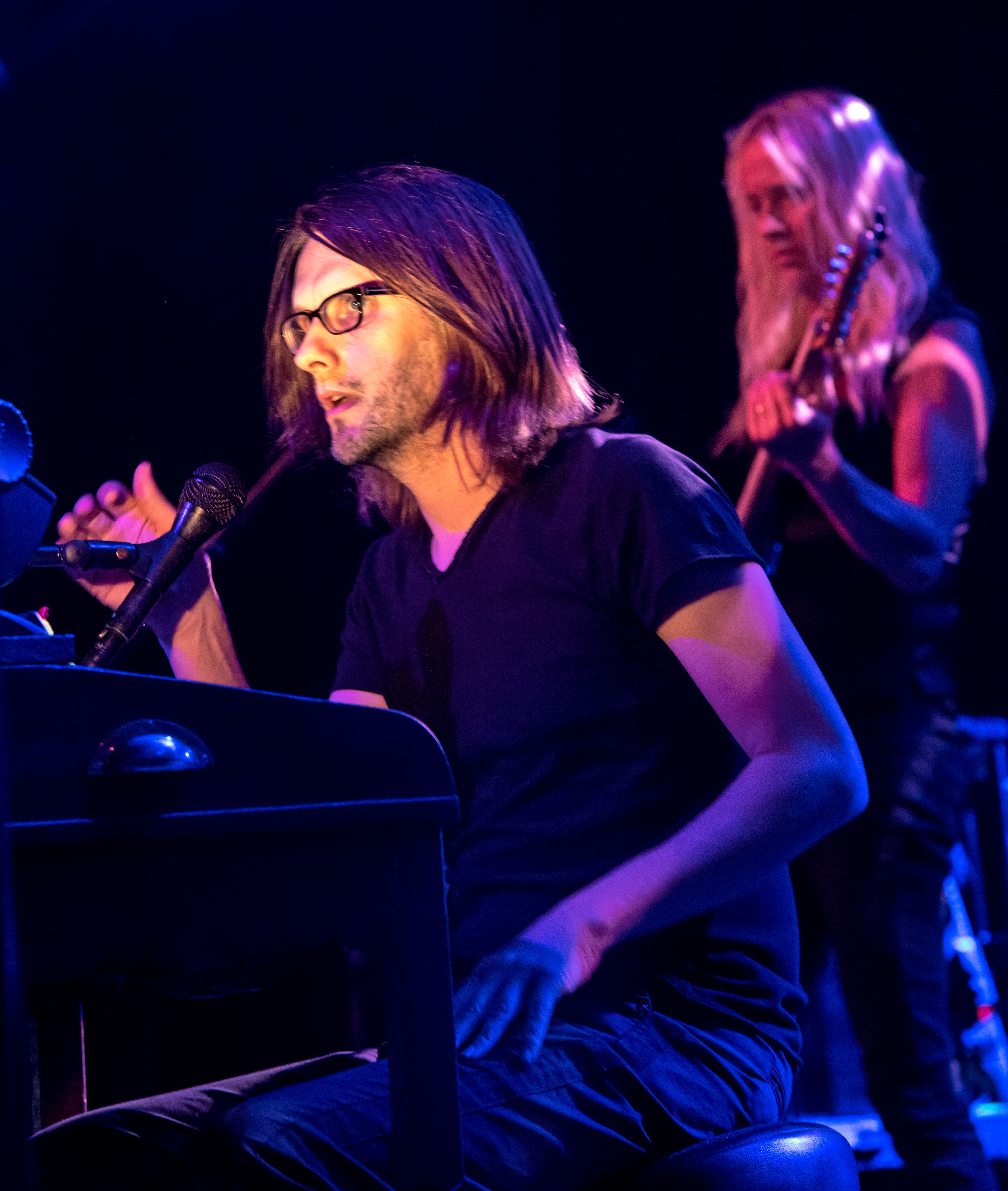 Bilder vom Zelt Musik Festival 2016 in Freiburg im Breisgau Steven Wilson